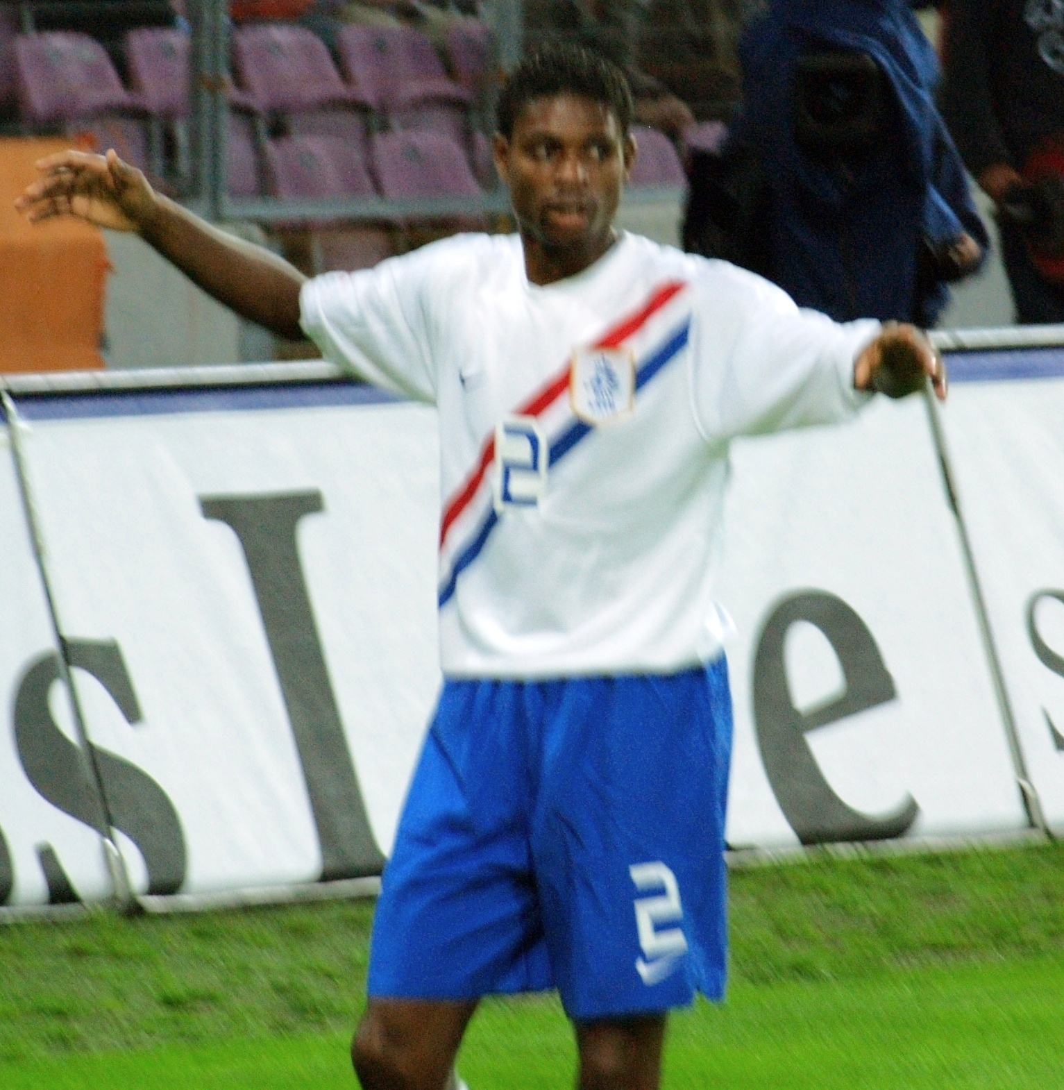 Kew Jaliens